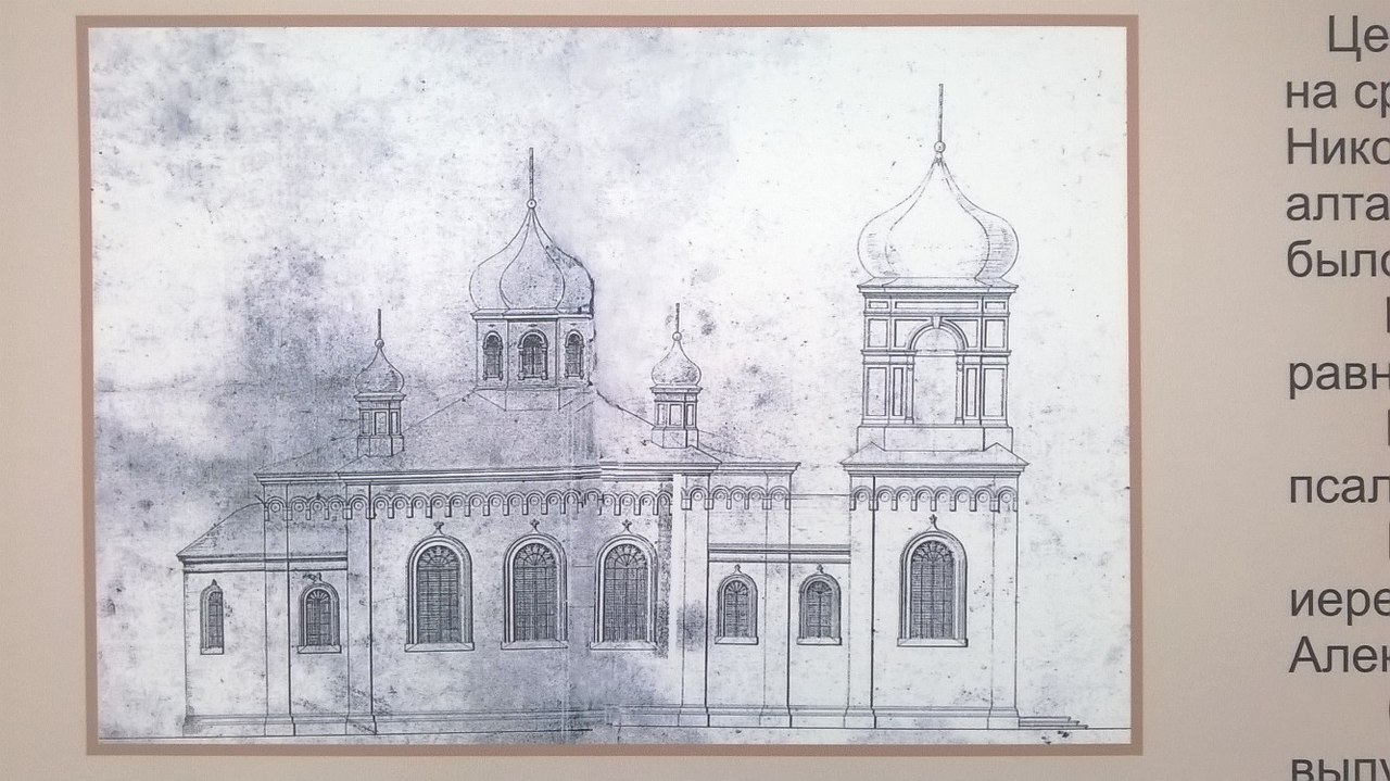 Церковь